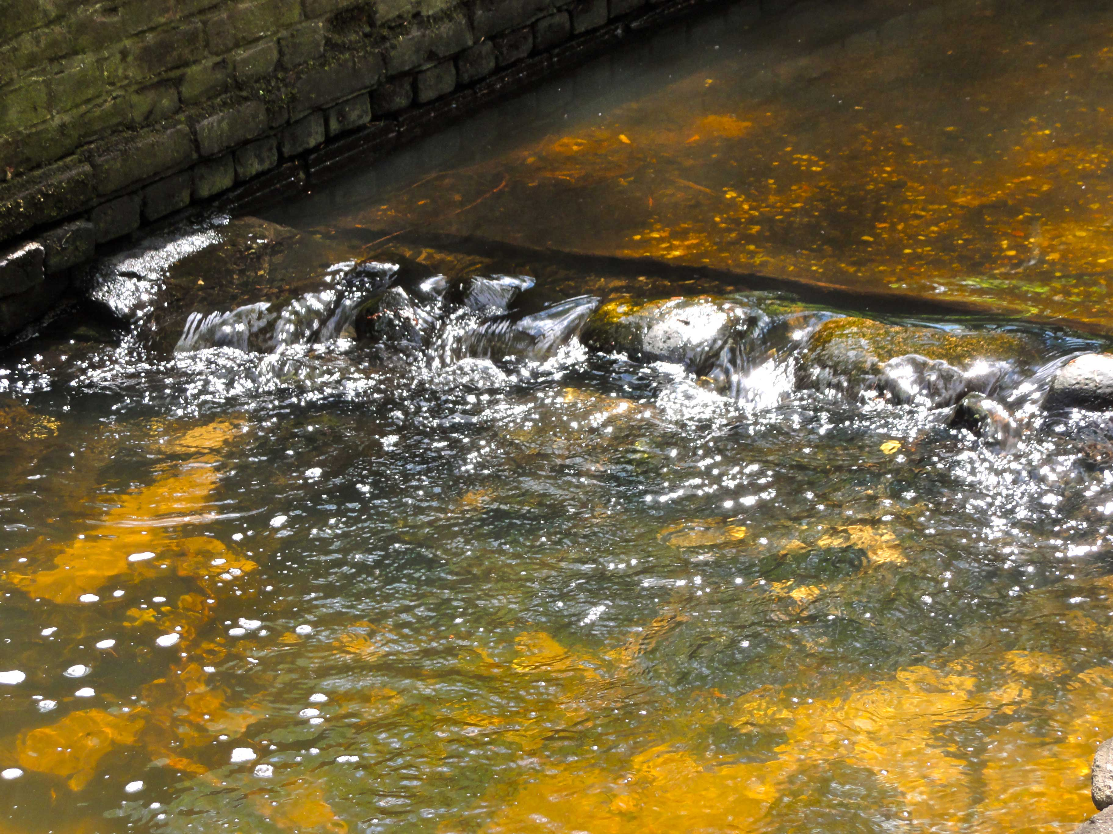 "Watervalletje" in de Leuvenumsche Beek nabij de plaats waar de Zandmolen heeft gestaan